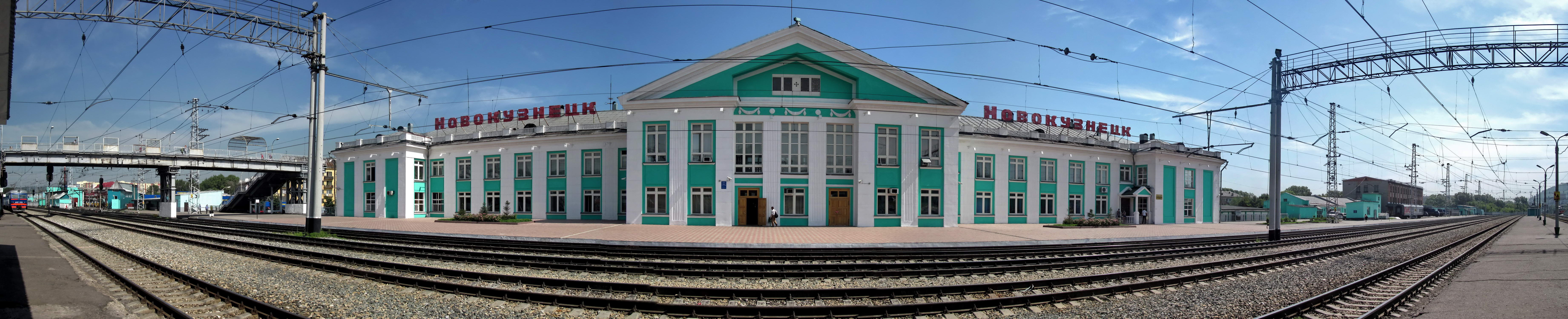 Новокузнецк Вокзал (панорама на 180°)